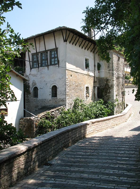 Street in Gjirokastër